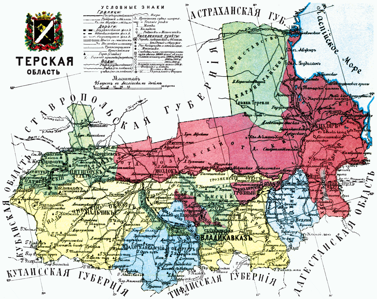 Карта Терской области, 1913